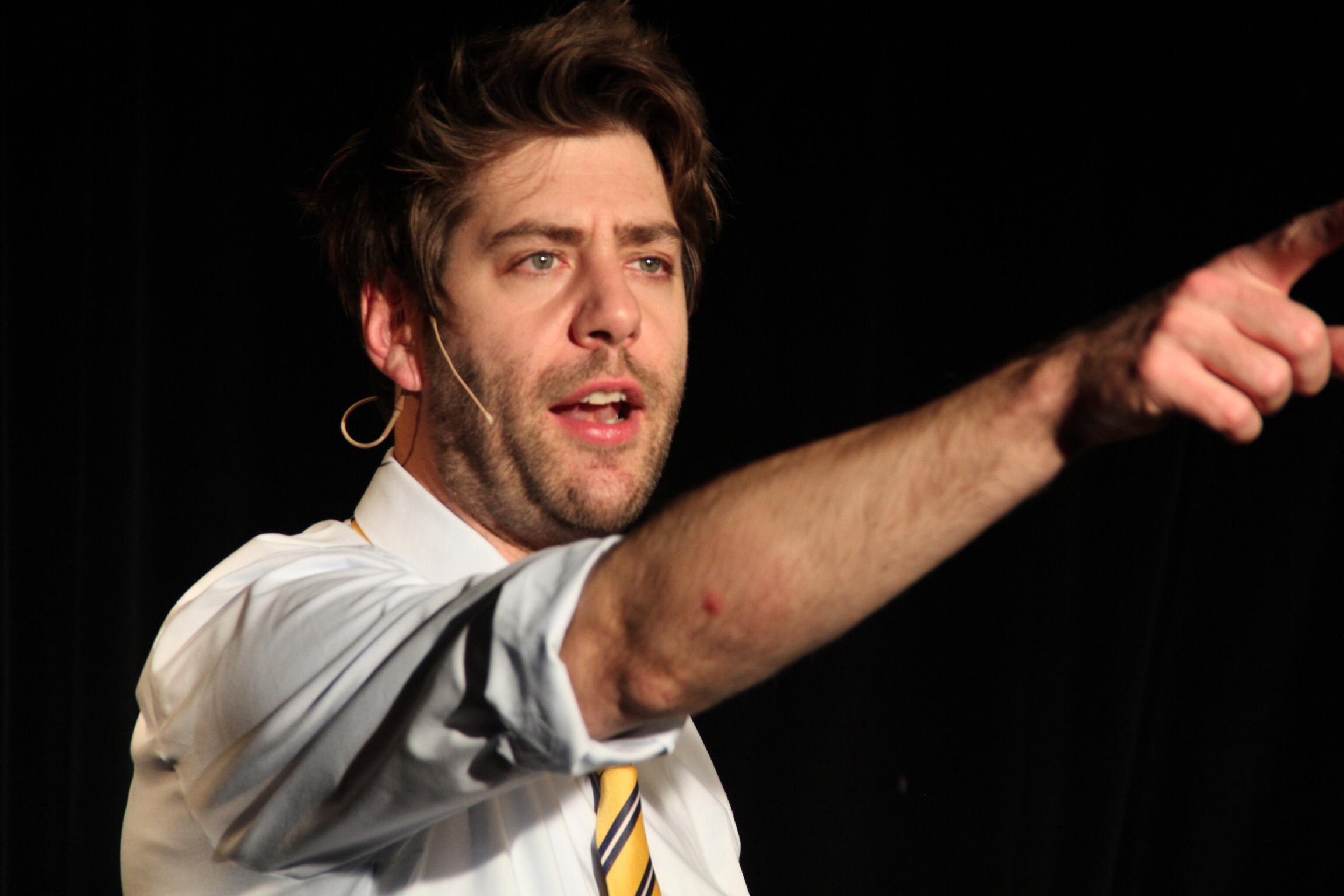 Cabarettist